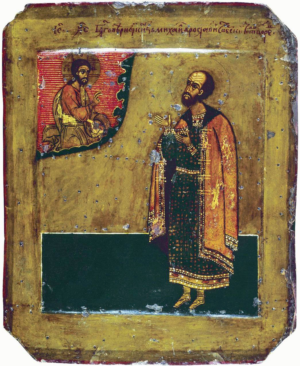 Saint prince Michael of Tver. Святой князь Михаил Тверской